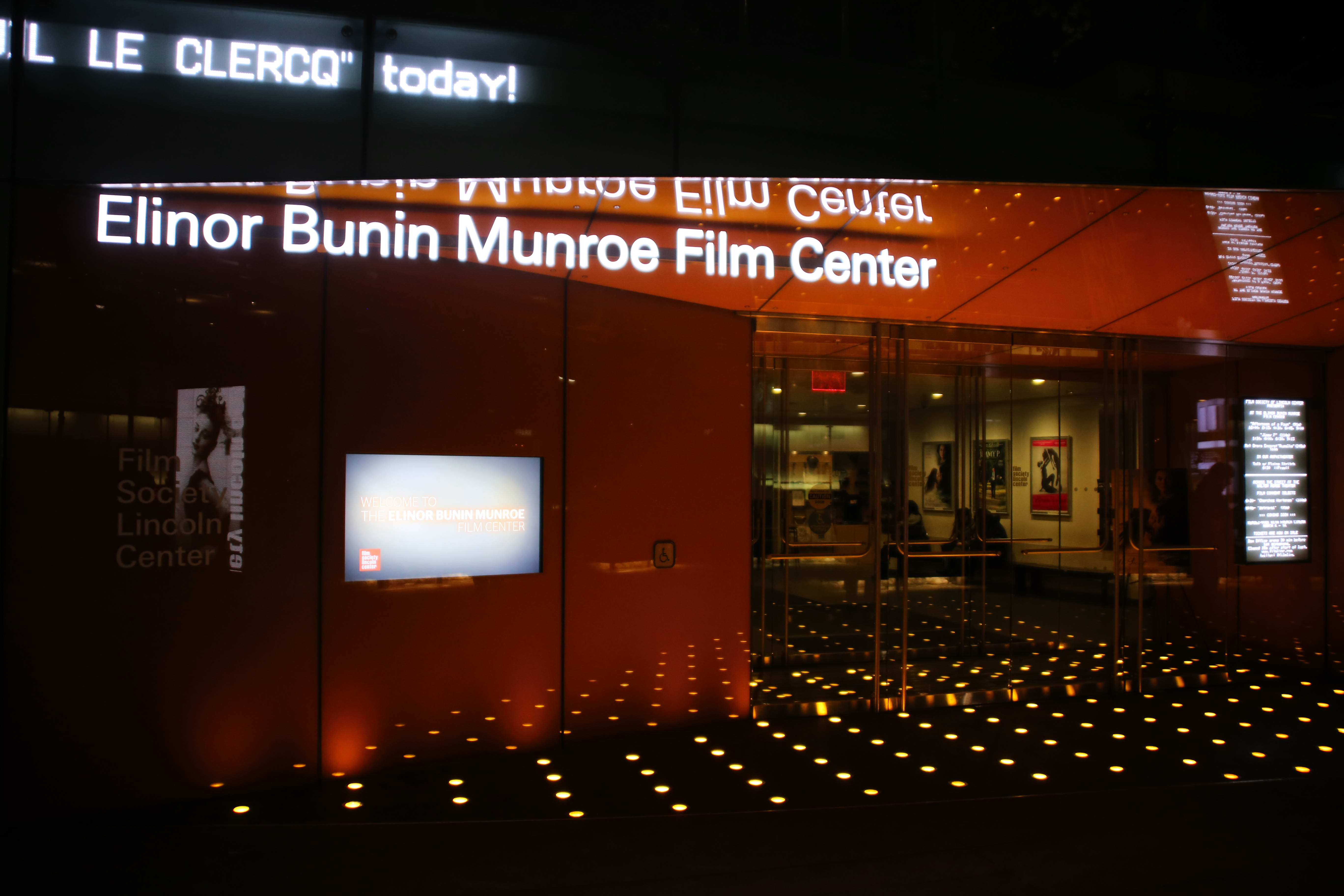 Elinor Bunin Munroe Film Center